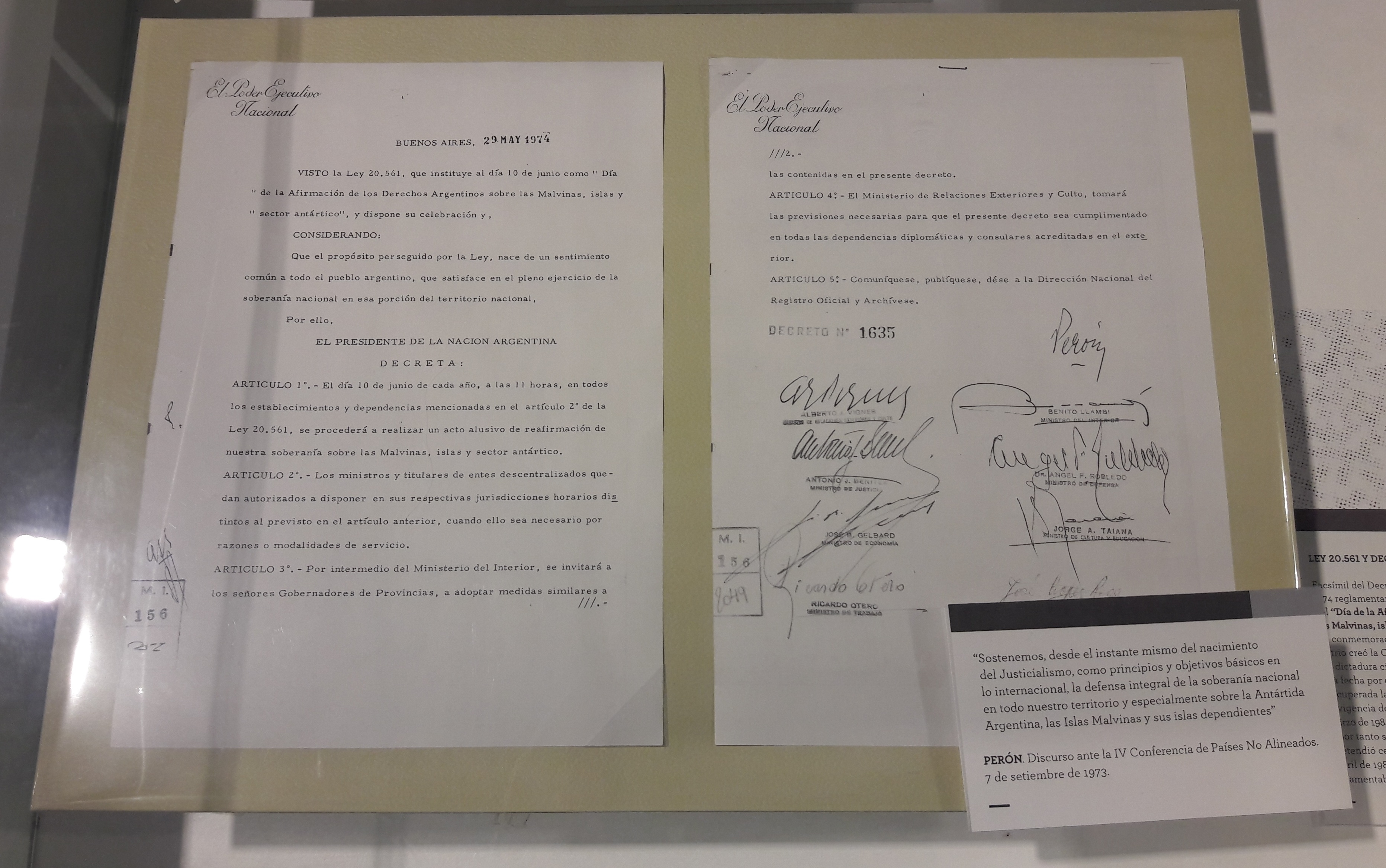 Decreto de Perón reglamentando la ley del Congreso que creó el Día de la Afirmación de los Derechos Argentinos sobre las Malvinas, Islas y Sector Antártico. Museo Malvinas, Núñez, Buenos Aires, Argentina.